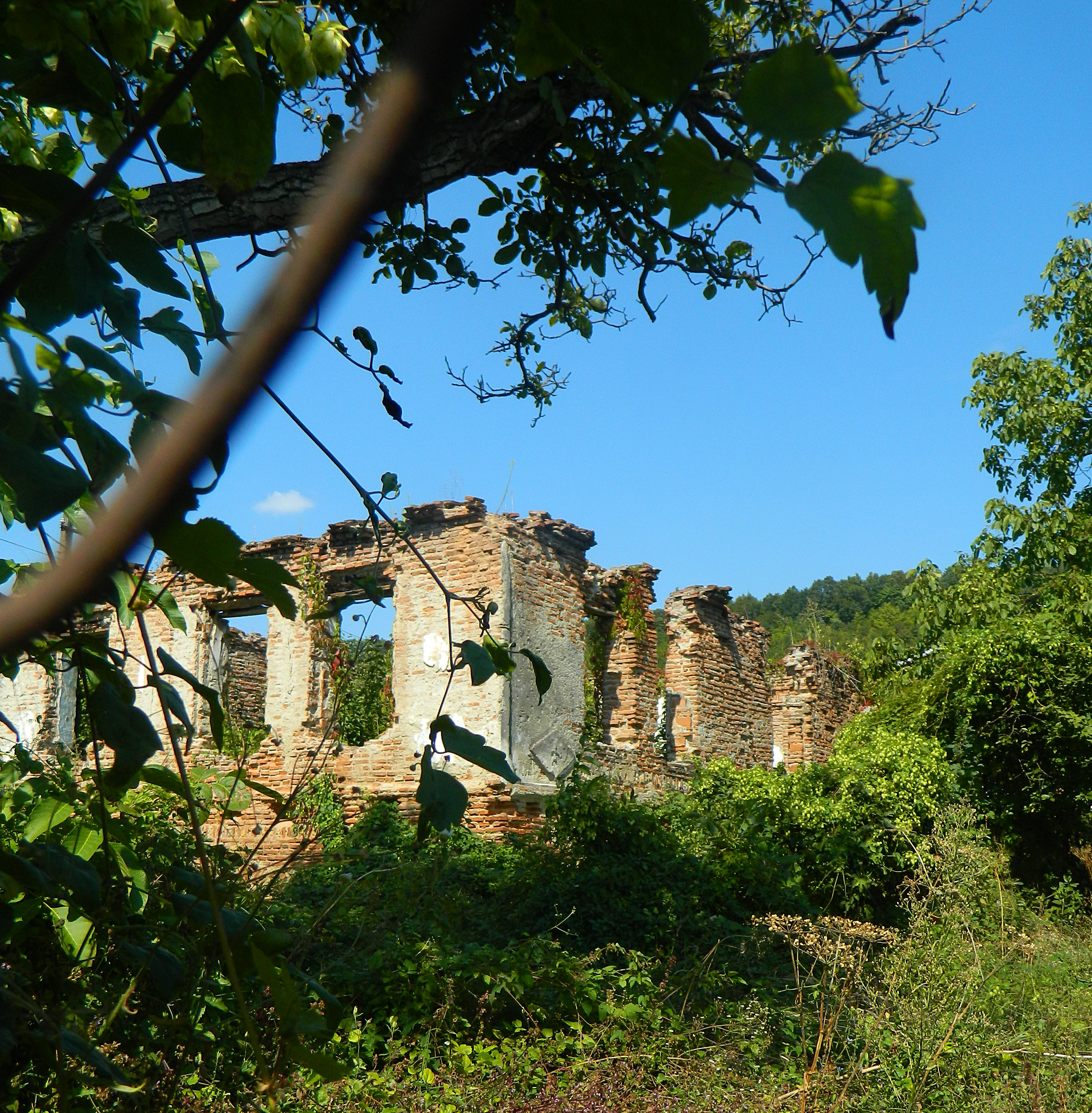 Ruine conac 01